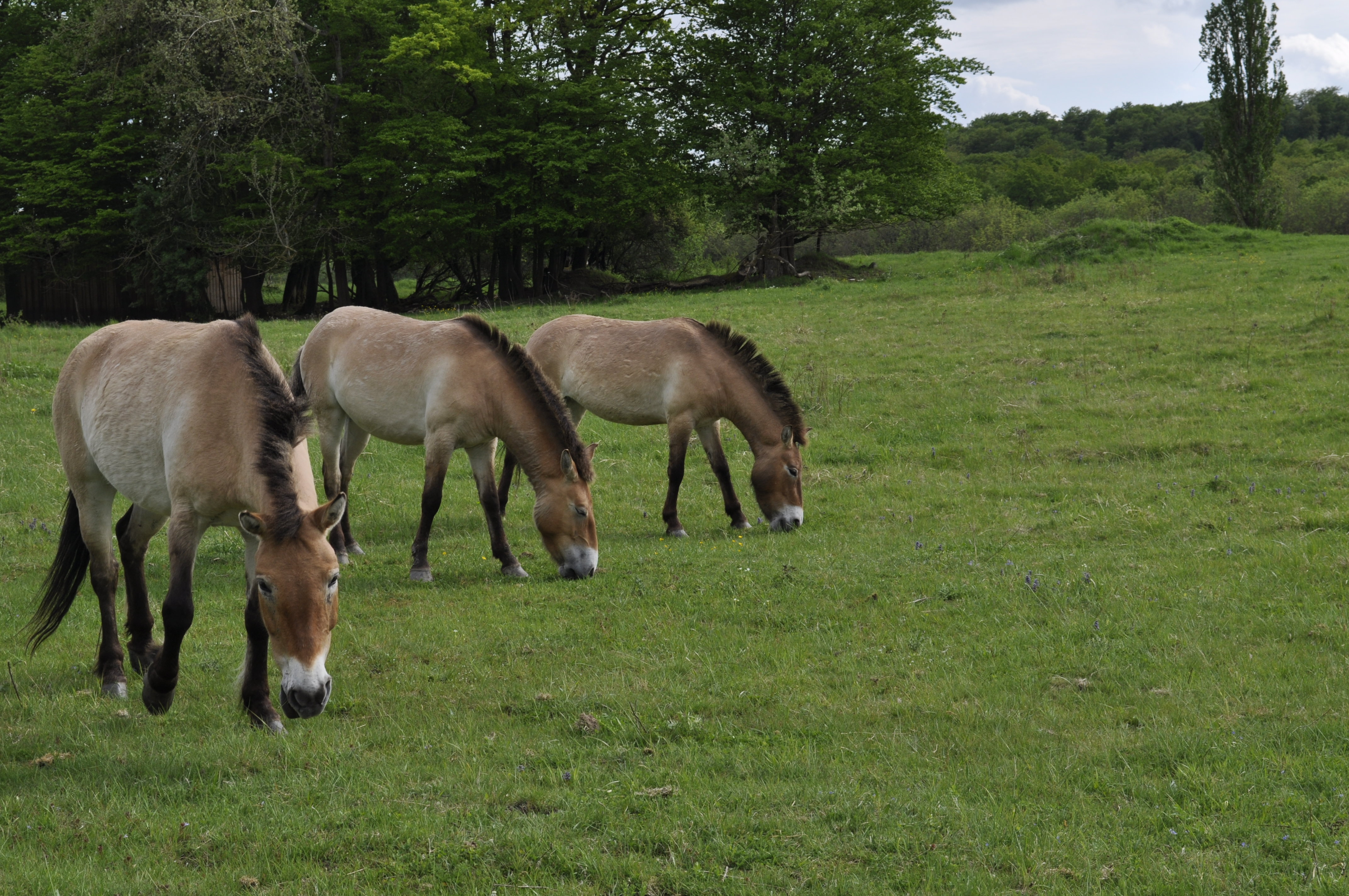 (NSG:HE-1531030)_Hohe Warte bei Gießen